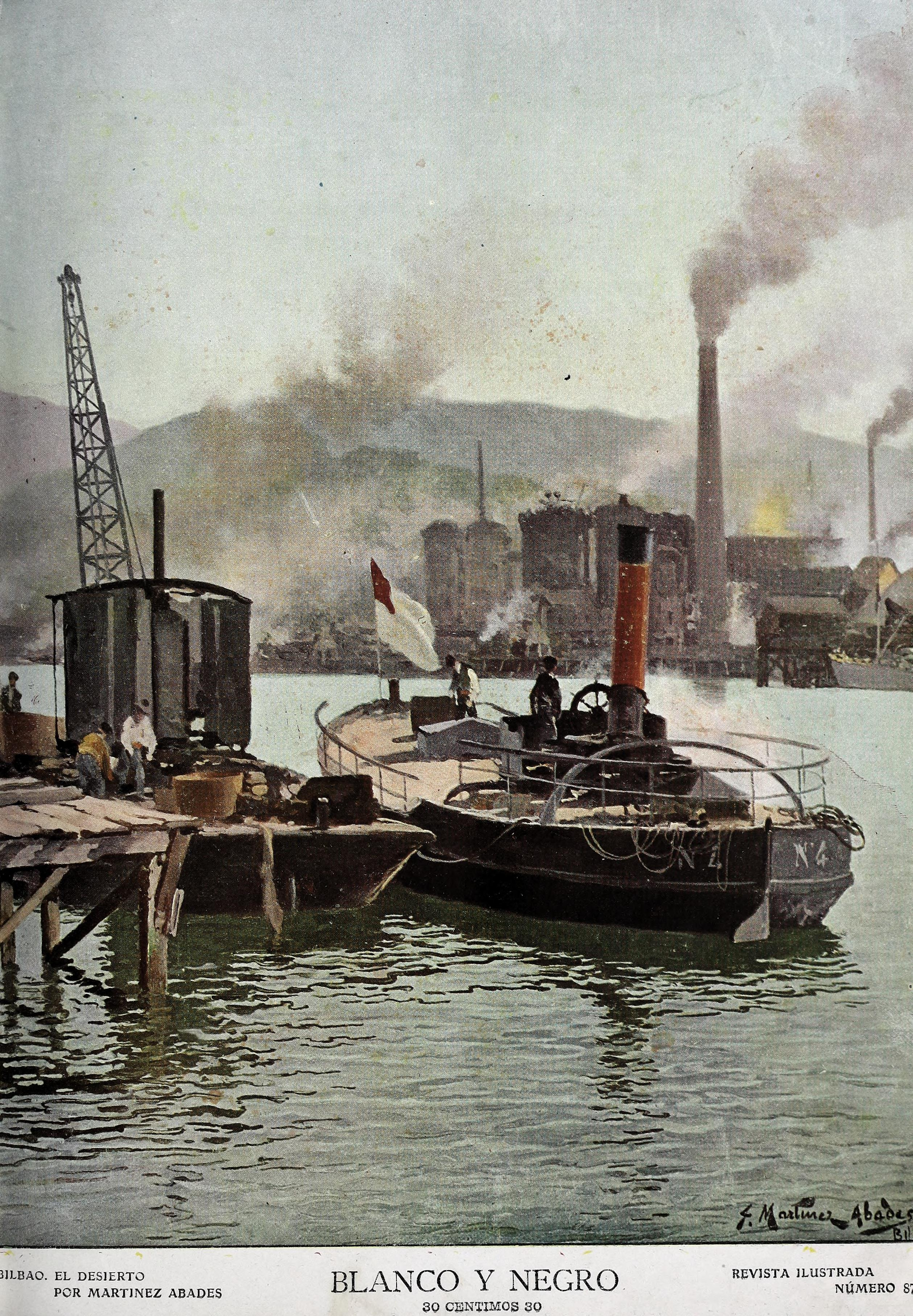 Bilbao. El desierto.